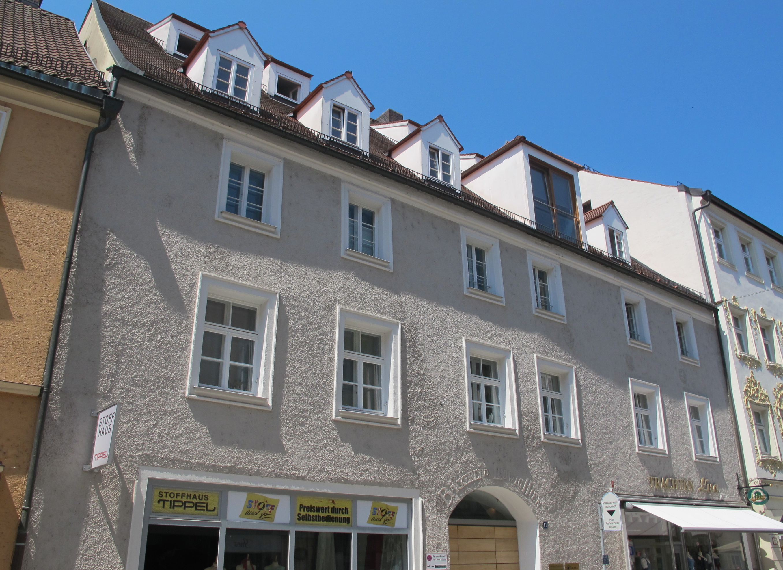 Baudenkmal Fraunhoferstraße 11 in Straubing